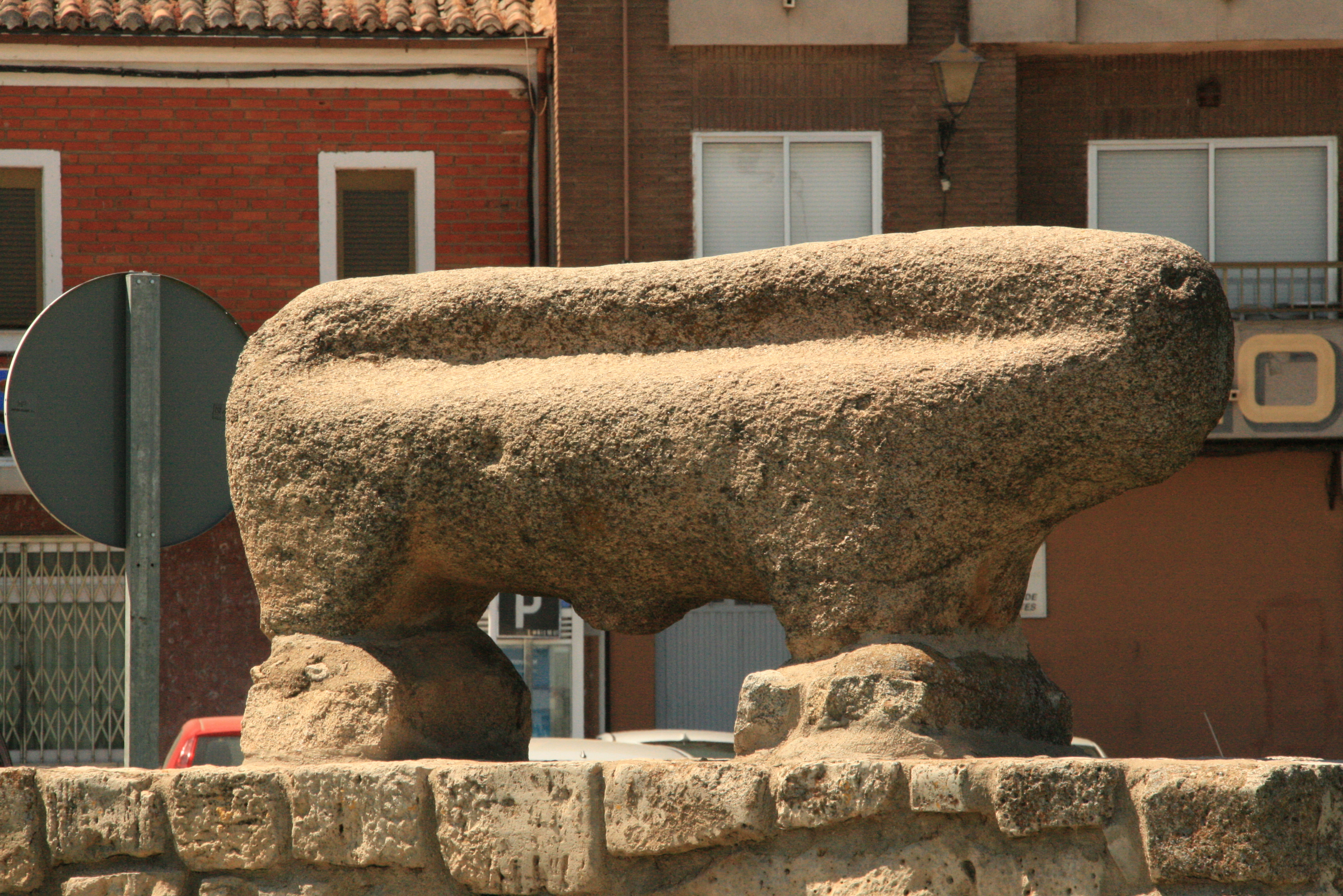 Verraco de piedra celtibérico en Toro (Zamora). De él tomó su nombre la localidad y definió también su blasón